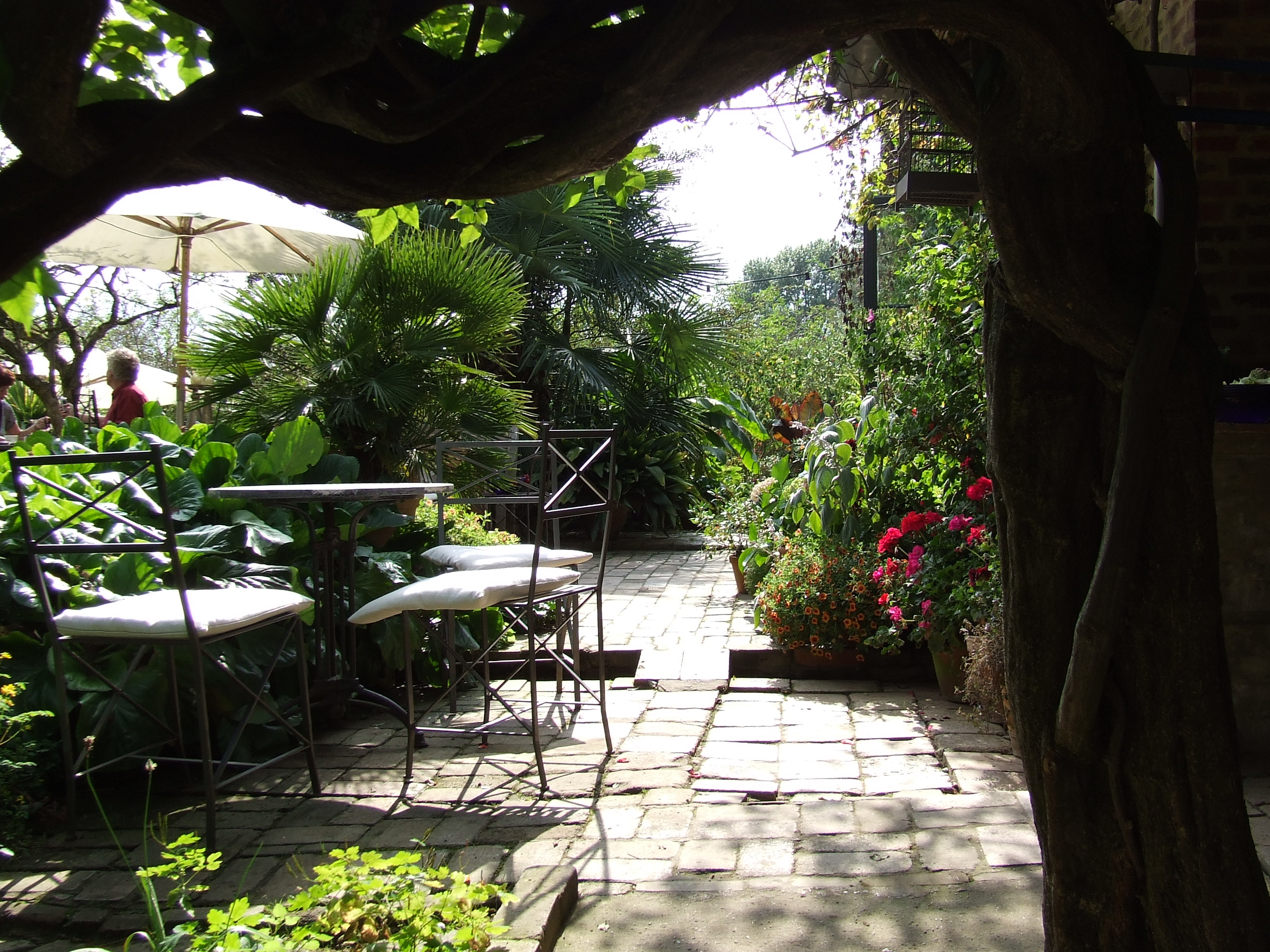 Zicht op een deel van de Millinger Theetuin, Klaverland 9, 6566 JD Millingen aan de Rijn